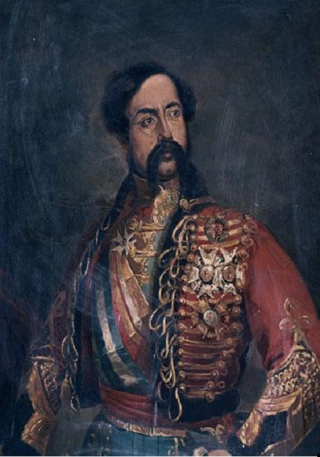 Retrato del teniente general Diego de León (1807-1841), conde de Belascoain y destacado militar por su valor en la Primera Guerra Carlista y fue fusilado en 1841 por haber asaltado el Palacio Real de Madrid e intentar secuestrar a la reina Isabel II de España.